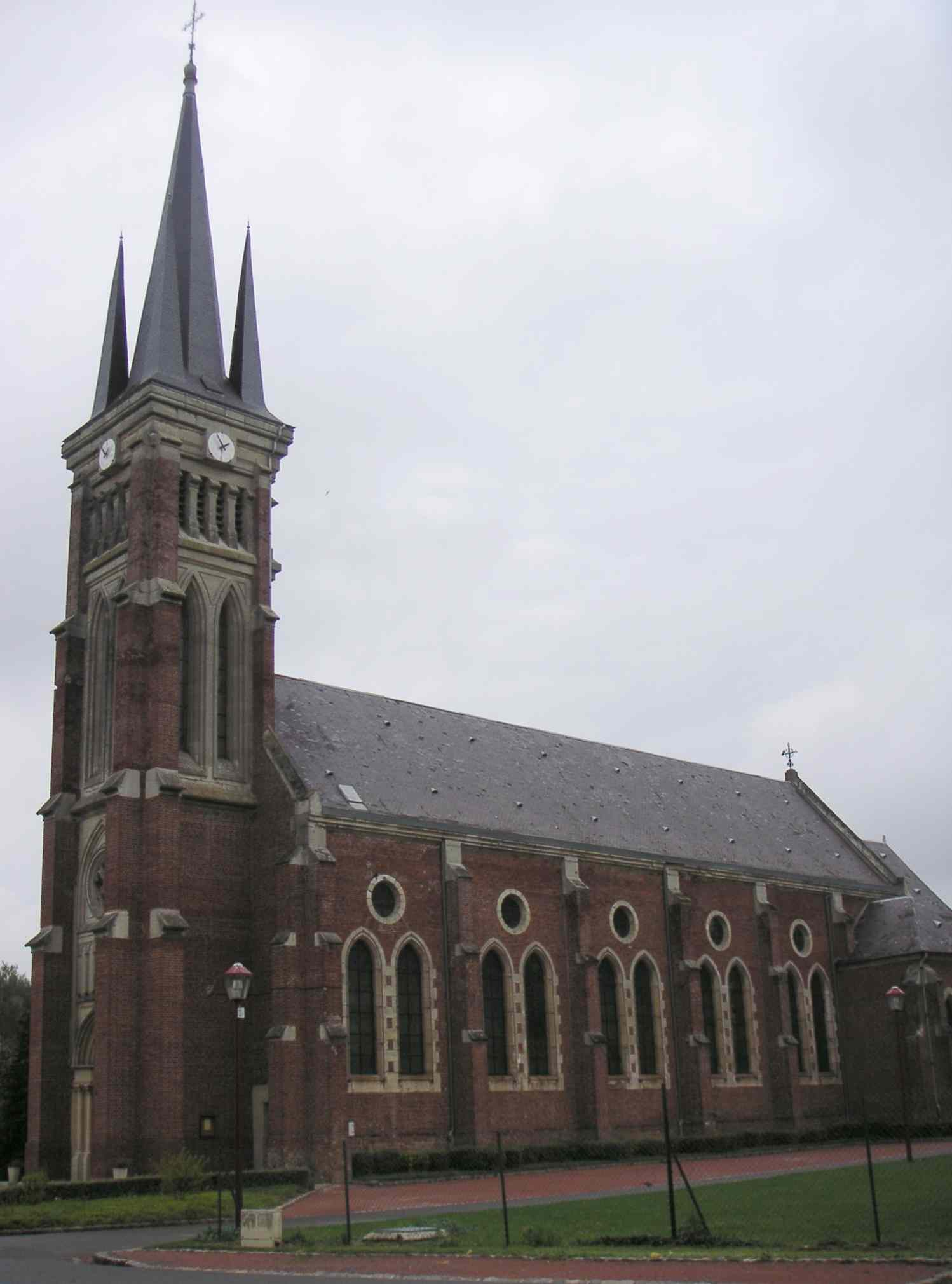 Photo de l'église de Le Hérie prise par User:LonganimE le 01/sept/2005